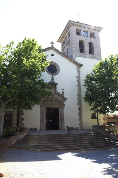 Església de Sant Genís a l'Ametlla del Vallès (Vallès Oriental-Catalunya), 1679.